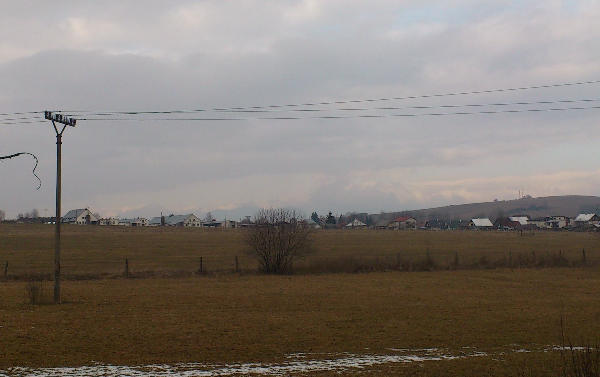 Pavčina Lehota